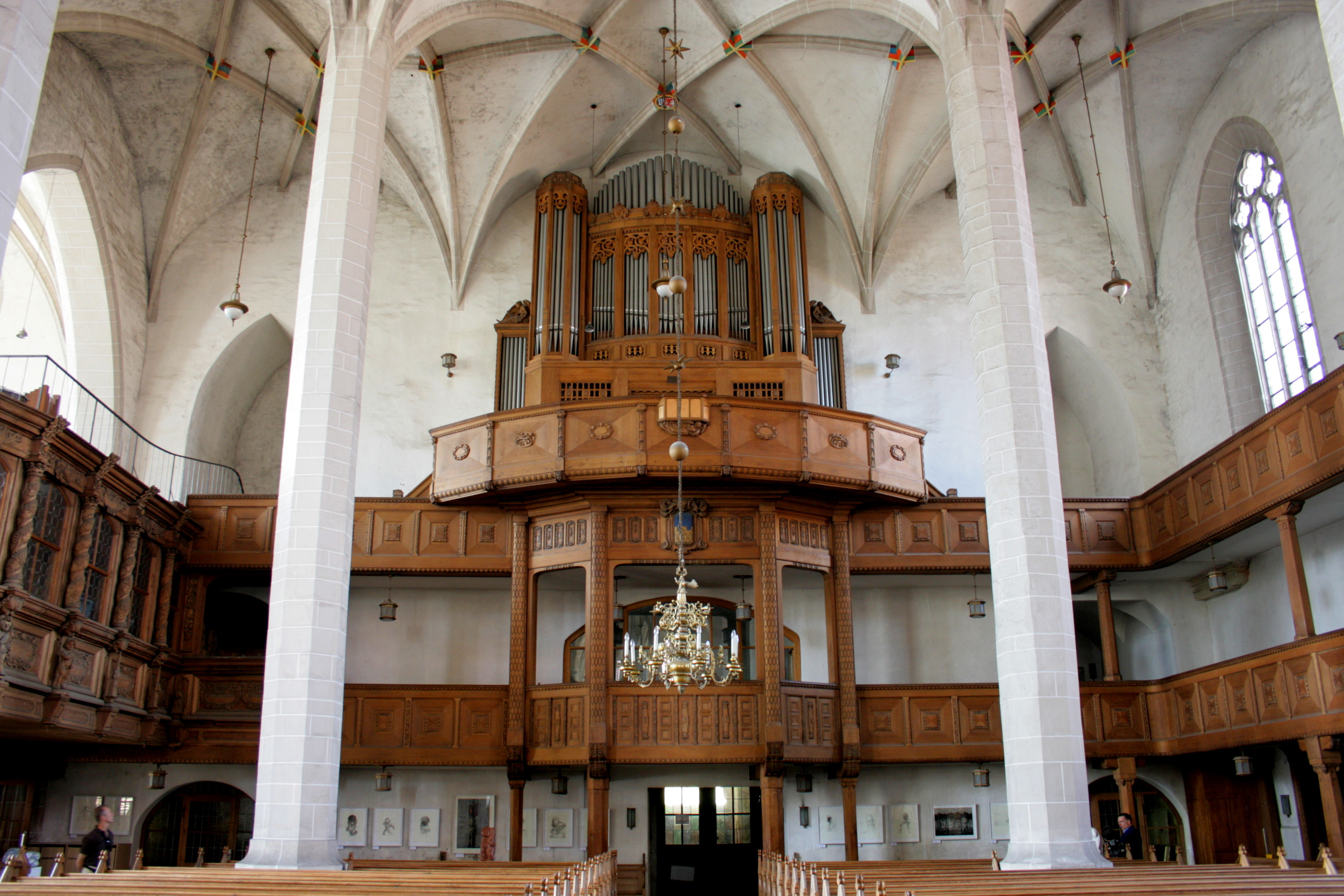 Dom St. Petri in Bautzen, evangelischer Teil Hornjoserbsce: Tachantska cyrkej swj. Pětra w Budyšinje; ewangelski dźěl.